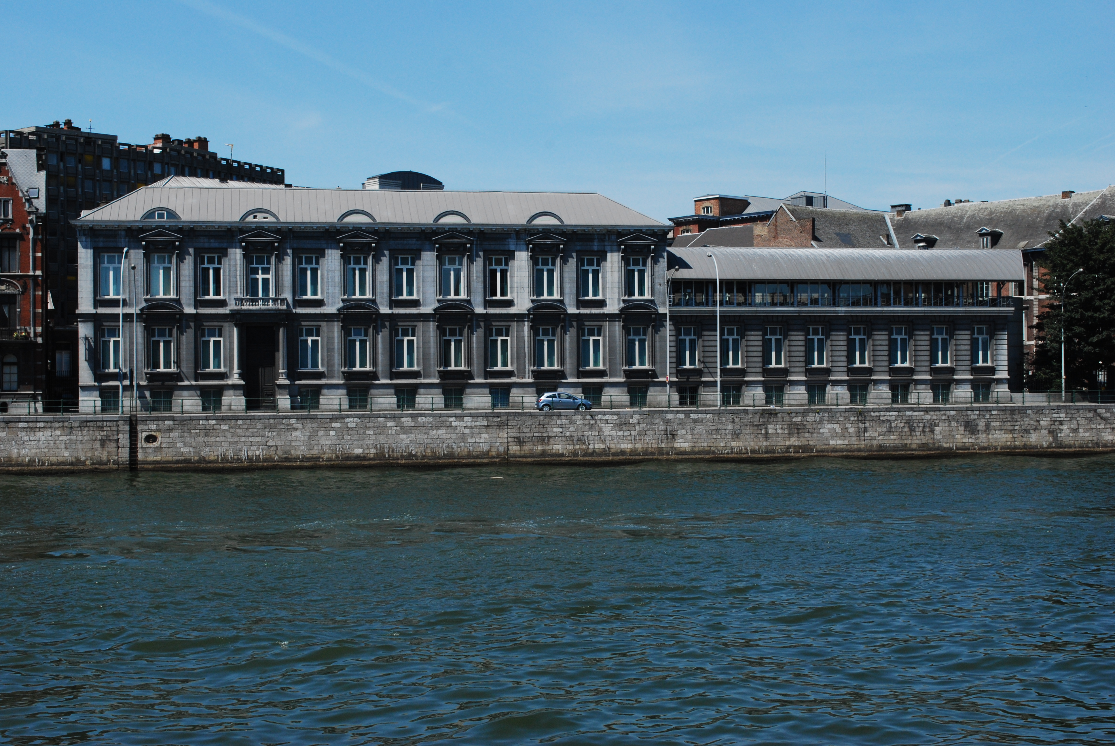 Les bâtiments de la Faculté de Philosophie et Lettres (ancien Institut de Chimie) de l'Université de Liège, sur le quai Roosevelt.